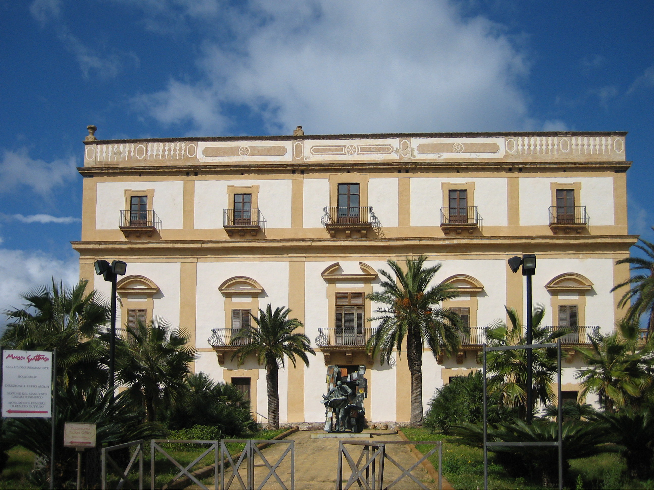 Das Bild zeigt die Villa Cattolica in Bagheria. In ihr befindet sich die permanente Ausstellung von Werken des sizilianischen Malers Renato Guttuso.